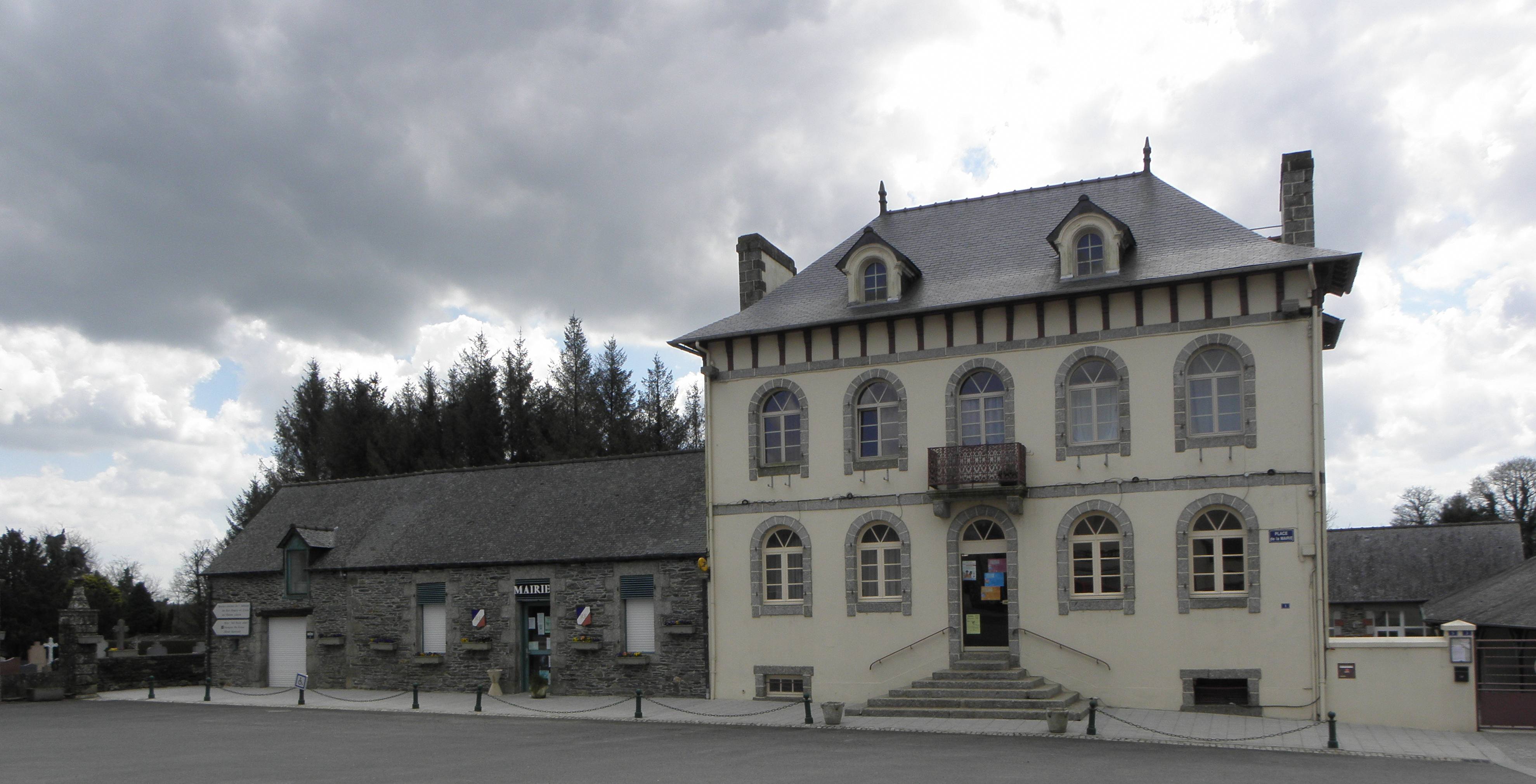 Mairie de Saint-Mayeux (22).